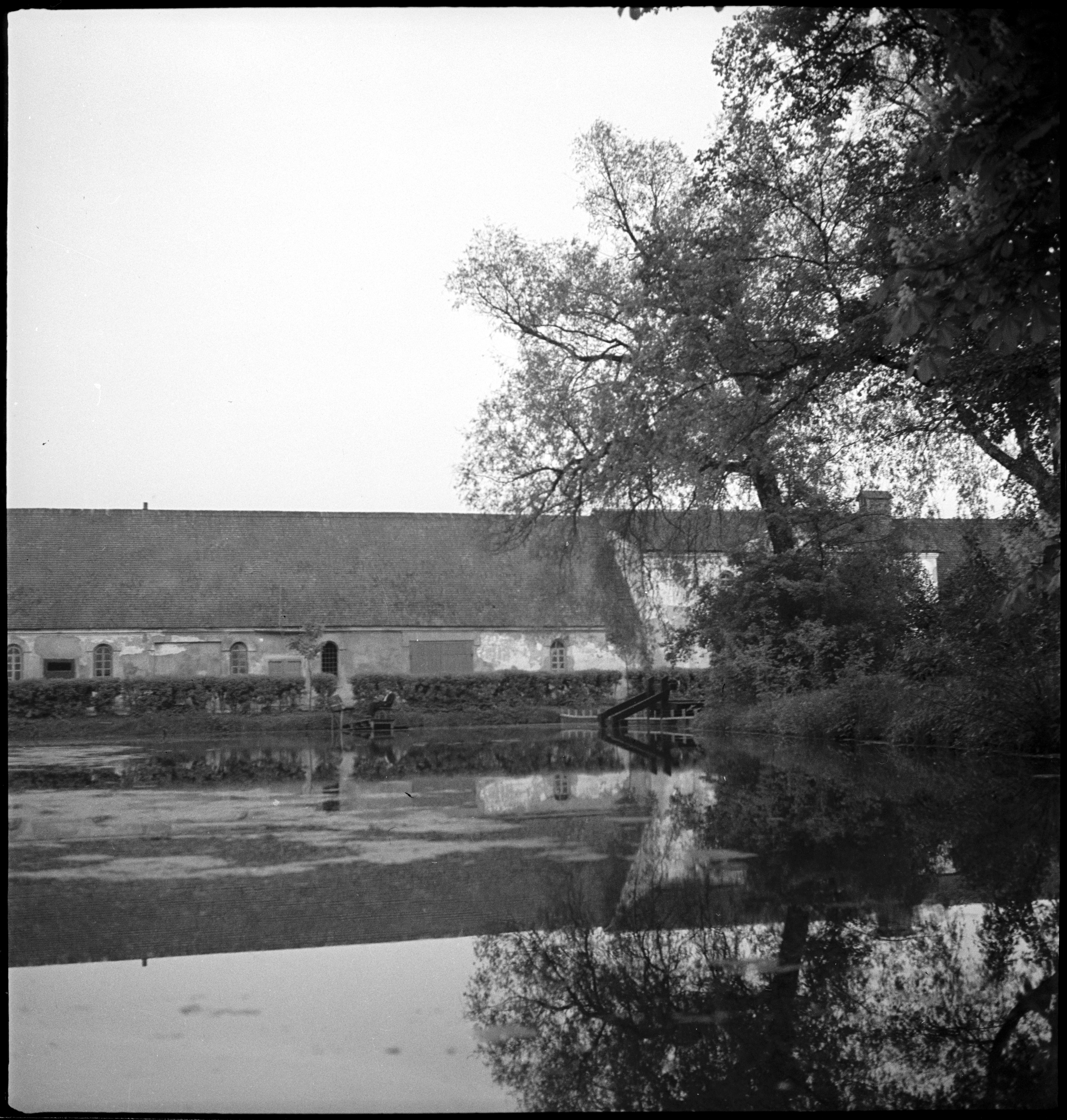 Litauen: Häuser; Haus an einem See liegend